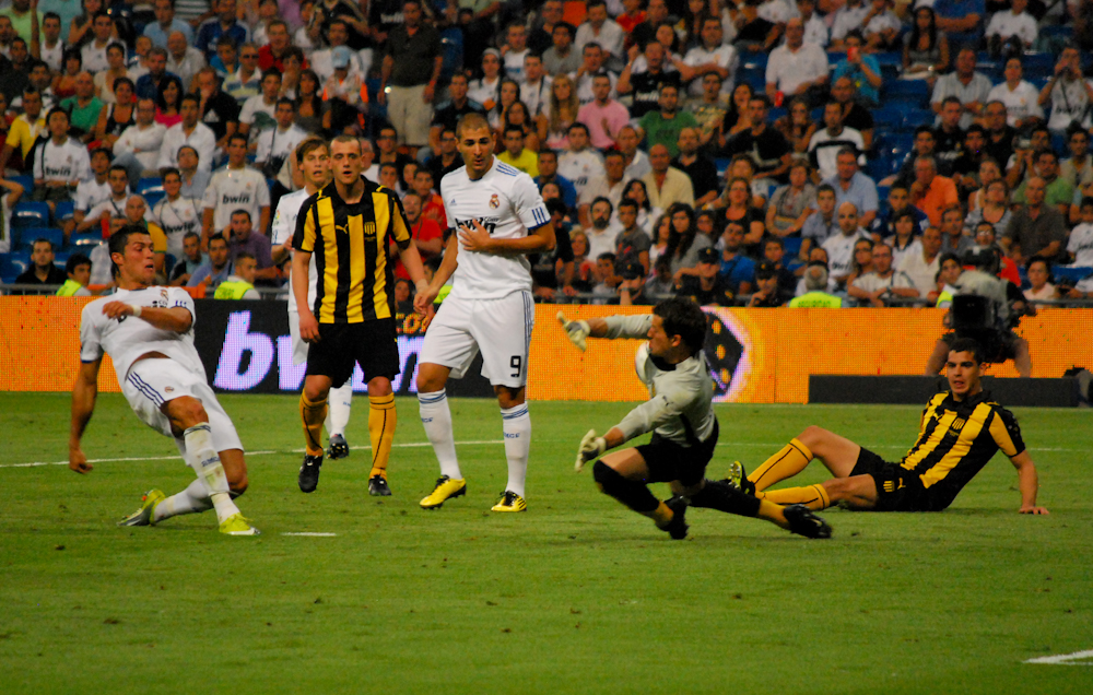 Sebastián Sosa atajando un tiro de Cristian Ronaldo